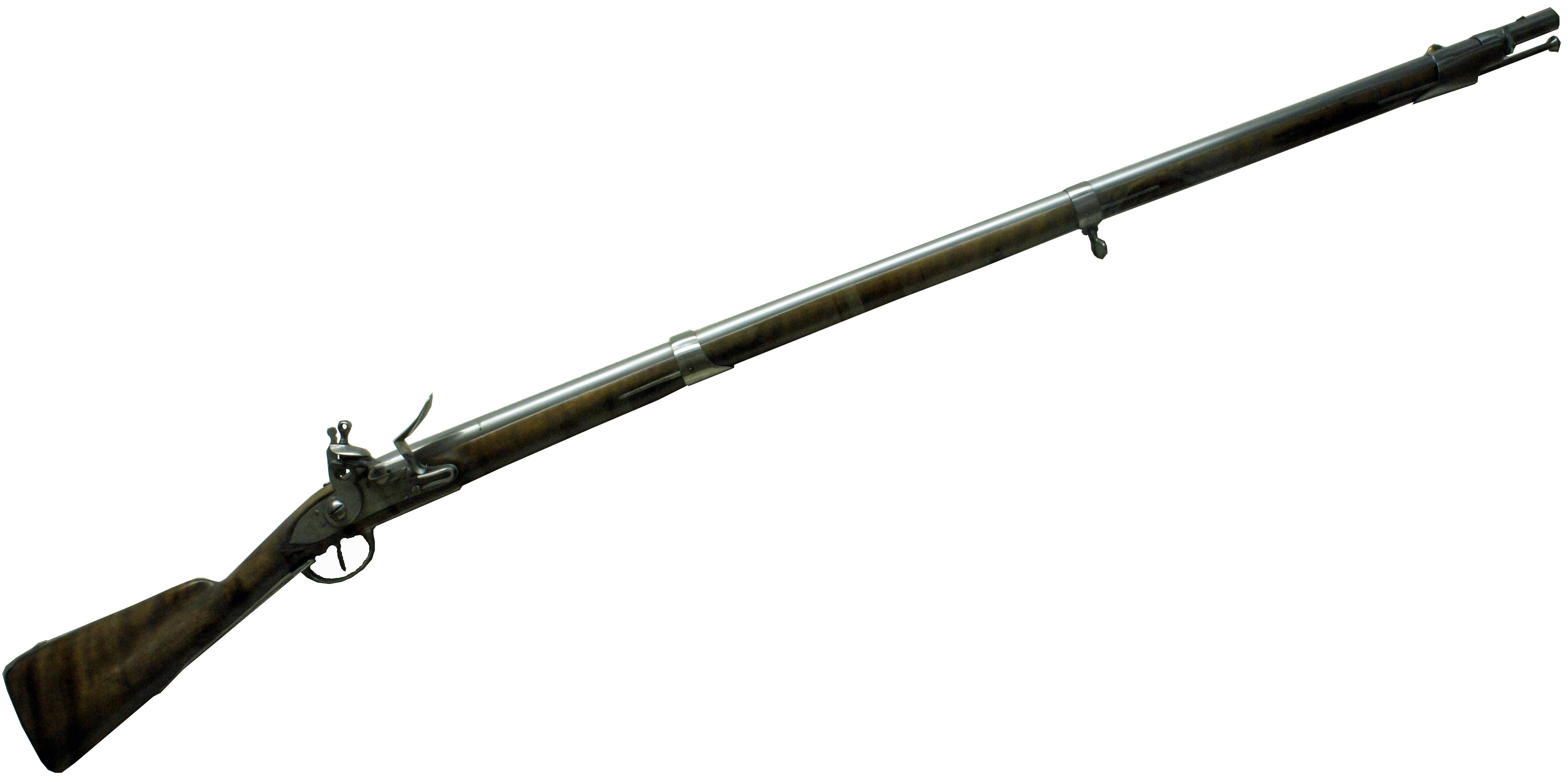 Fusil d'infanterie du modèle 1766 fabriqué à la manufacture d'armes de Charleville.